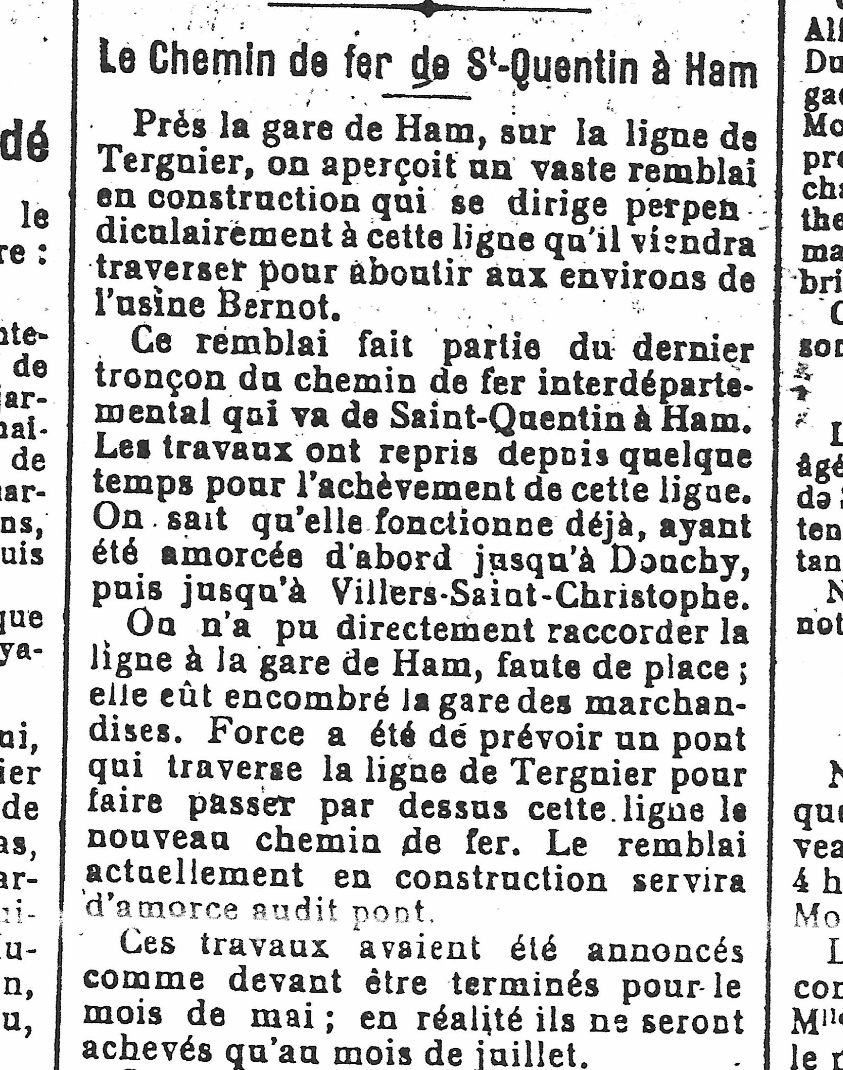 Article journal partie 1